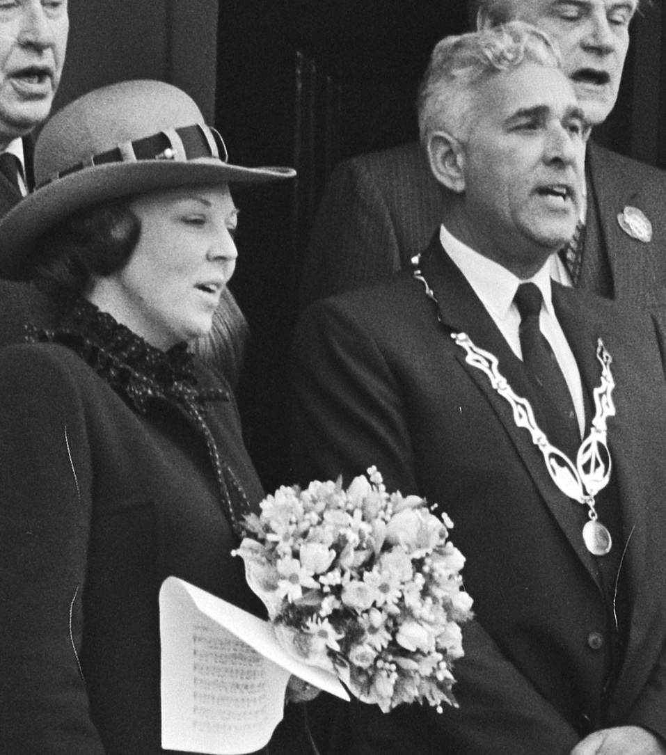 Koningin Beatrix en Egbert Steenbeek tijdens koninginnedag 1982; Beatrix bezoekt Harlingen